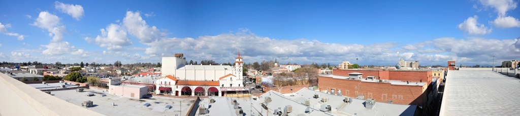 Visalia panorama